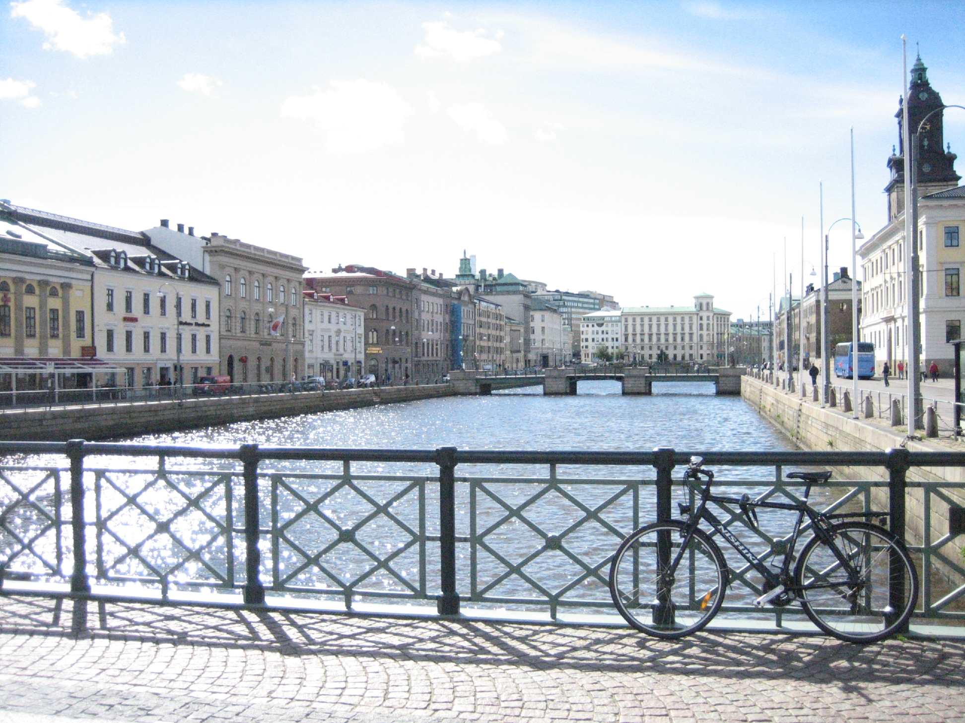 Brunnsparken, Göteborg